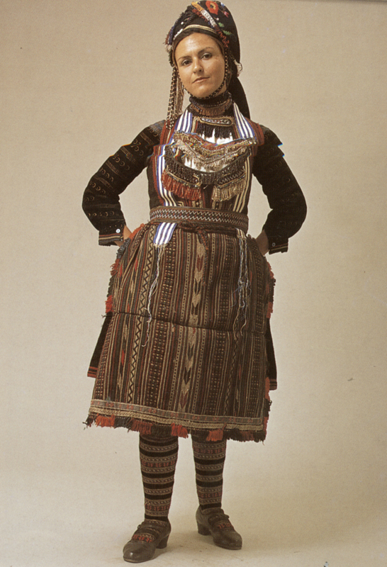 Νυφική ή γιορτινή φορεσιά Βλάχας Προσωτσάνης. Συλλογή Πελοποννησιακού Λαογραφικού Ιδρύματος, Ναύπλιο